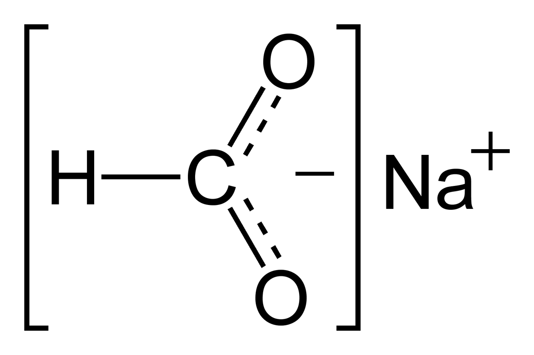 Structural formula of sodium formate